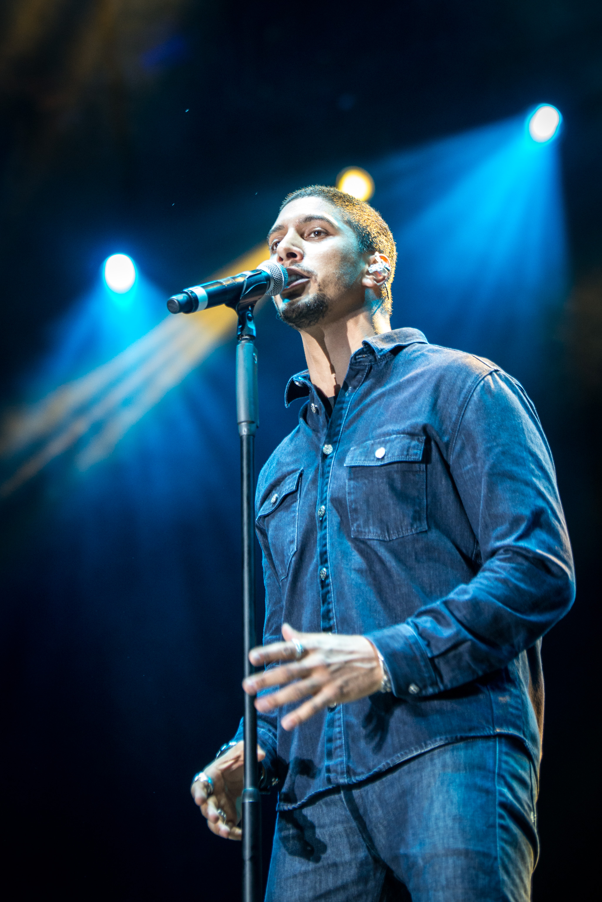 de